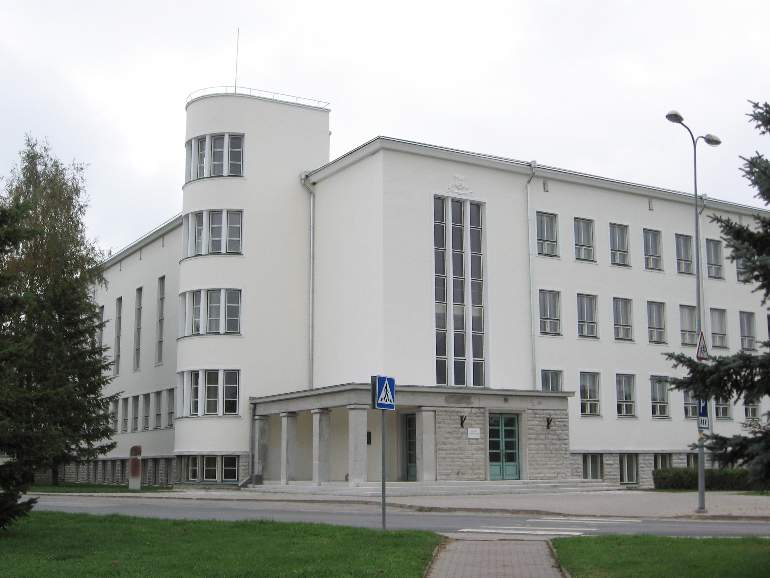 Rakvere ühisgümnaasiumi hoone